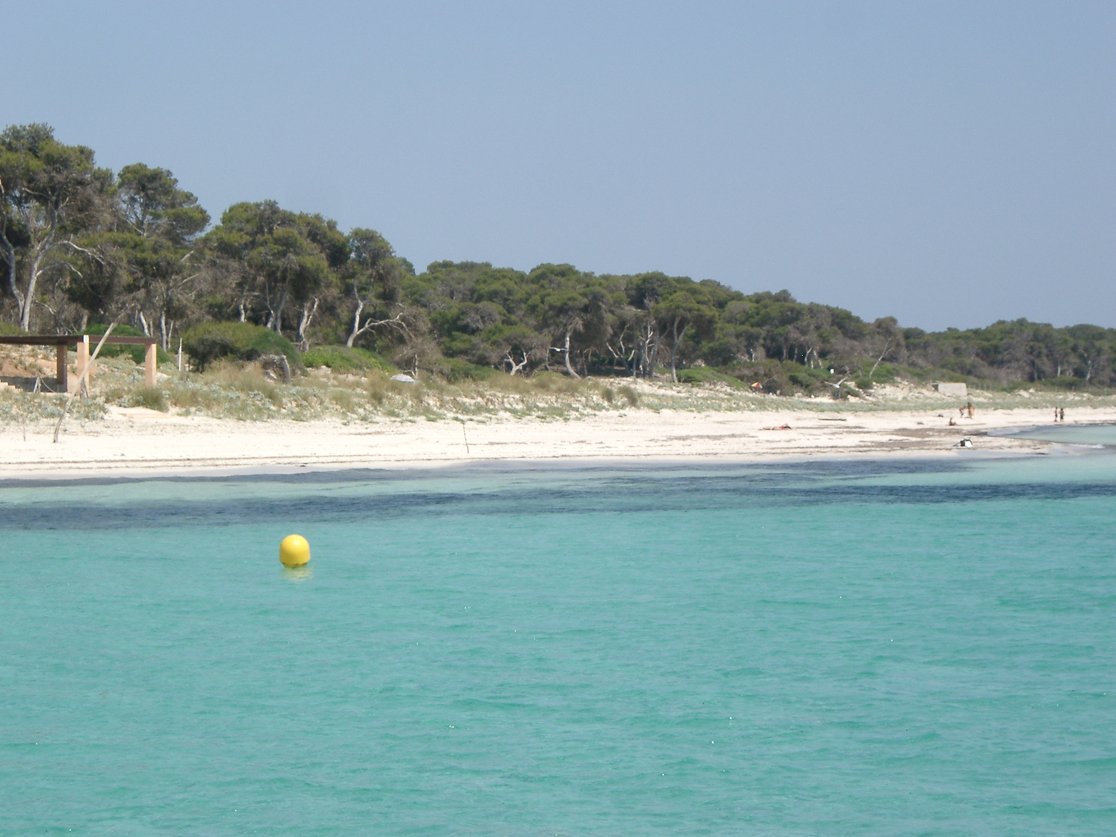 Es Carbo Colonia Sant Jordi